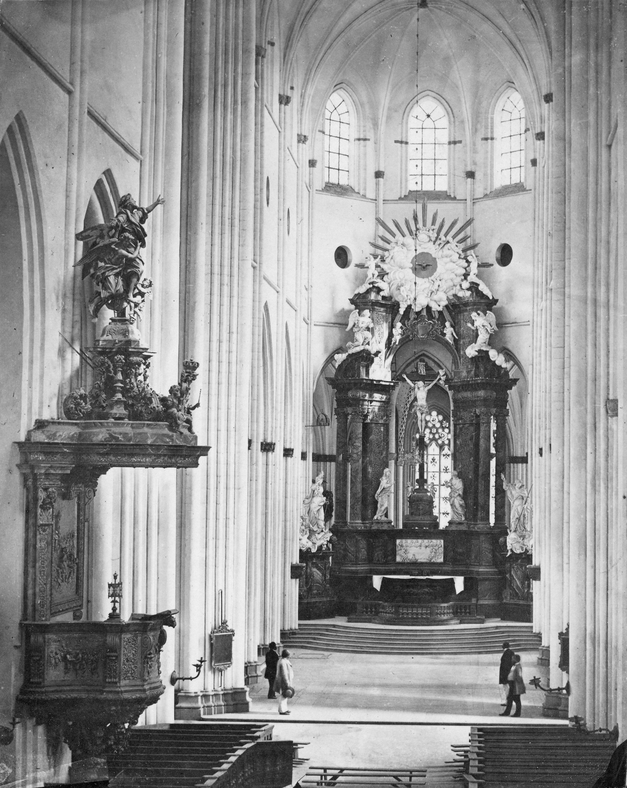 Interiör mot koret med det gamla högaltaret av Burchard Precht från 1731 (nu i Gustav Vasa kyrka, Stockholm). Kategori: (02) InteriörerInteriör mot koret med det gamla högaltaret av Burchard Precht från 1731 (nu i Gustav Vasa kyrka, Stockholm).